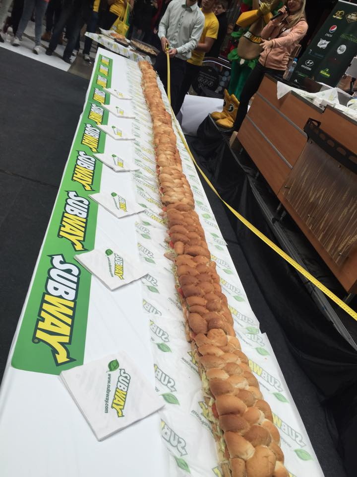 Najdlhší slovenský sendvič